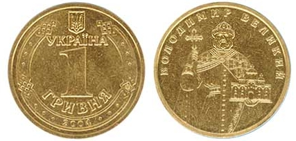 1 hrywnja - Volodymyr the Great